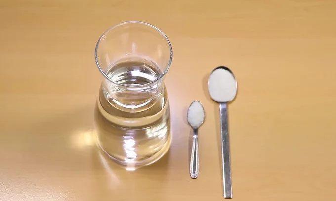 Soro caseiro, que tem como receita água, 1 medida rasa de sal, e 2 medidas rasas de açúcar